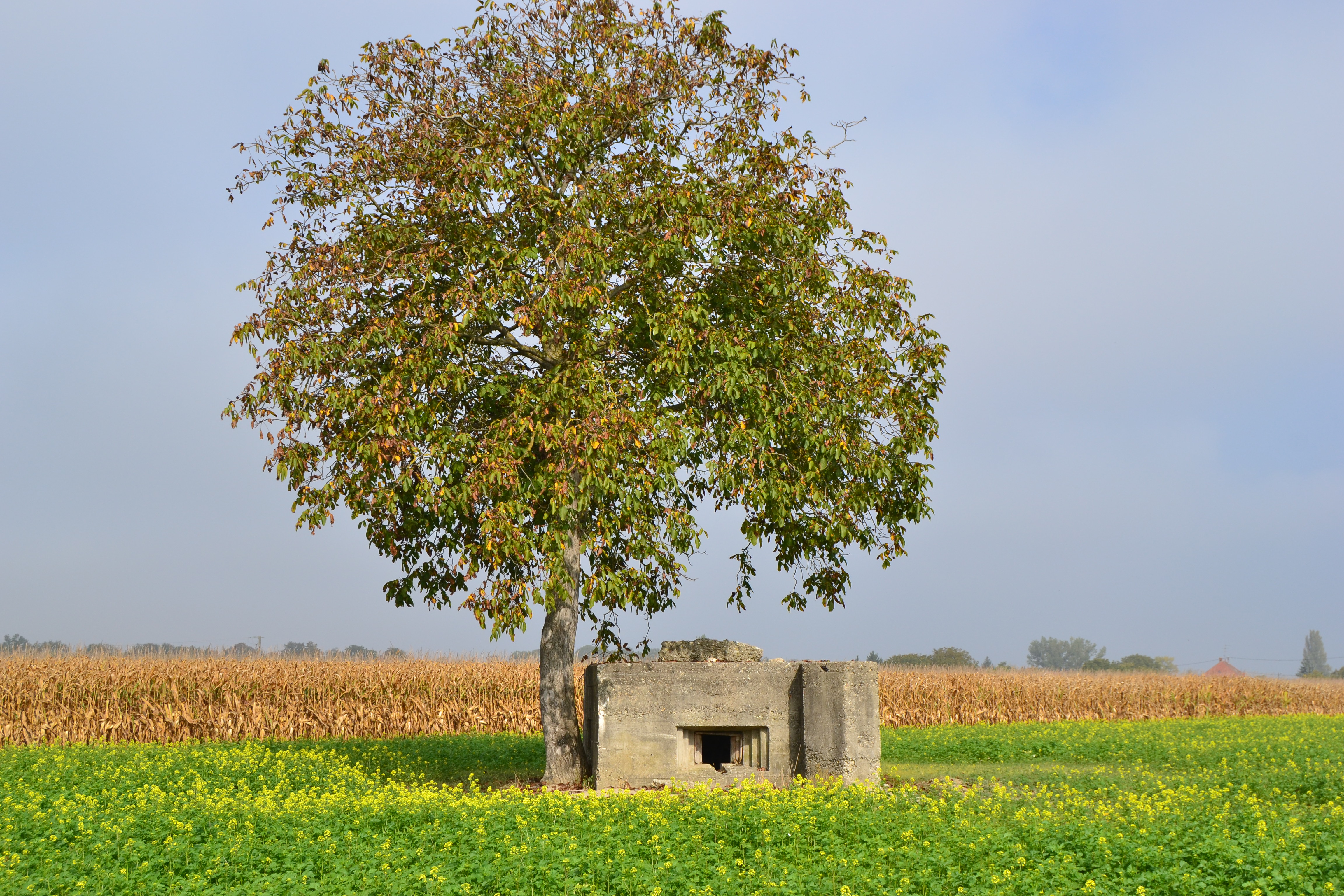 Point d'appui de la ligne Maginot, Geiswasser, Haut-Rhin, France